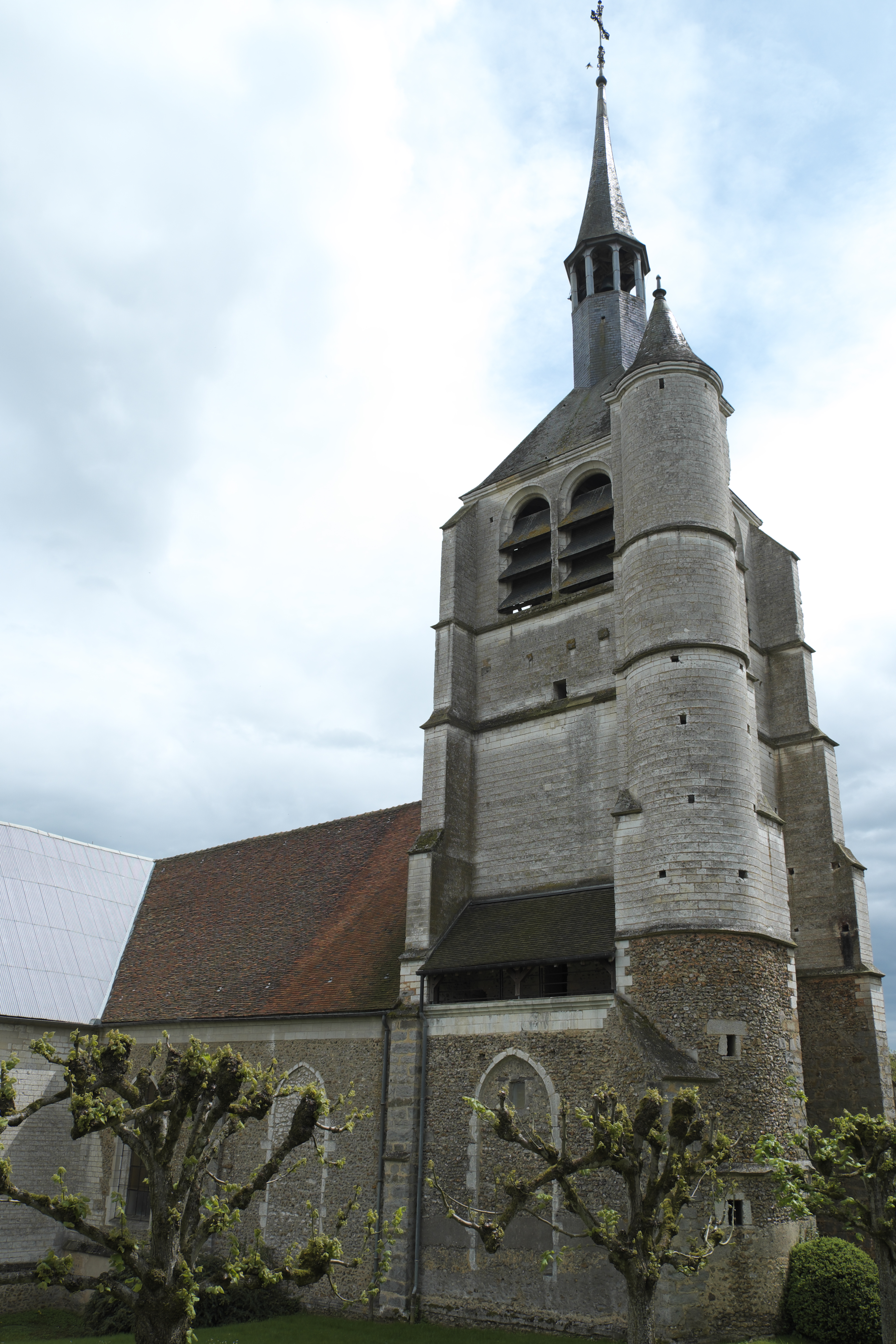 Kirche Notre-Dame-de-la-Nativité in Bérulle im Département Aube (Champagne-Ardenne/Frankreich), Glockenturm